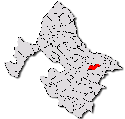 Categorie:Hărţi ale judeţului Mehedinţi